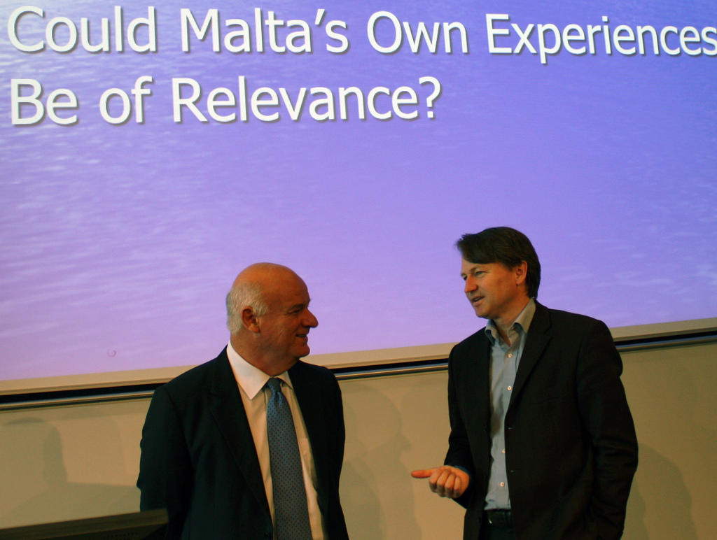 Joe Borg og Paal Frisvold samtaler før det åpne debattmøtet på universitetet i Reykjavik 25.9.2010.